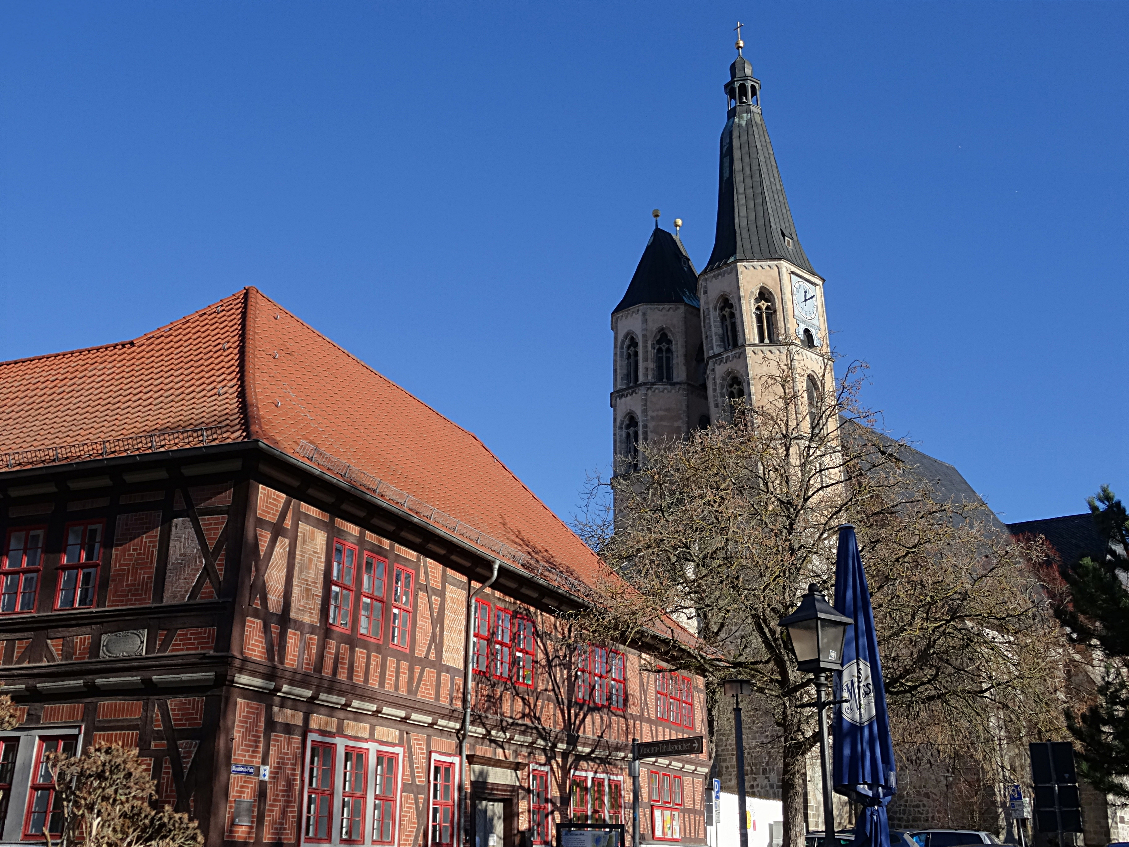 Pfarrhaus und Kirche St. Blasii (Nordhausen) mit dem schiefen Südturm (vorne)